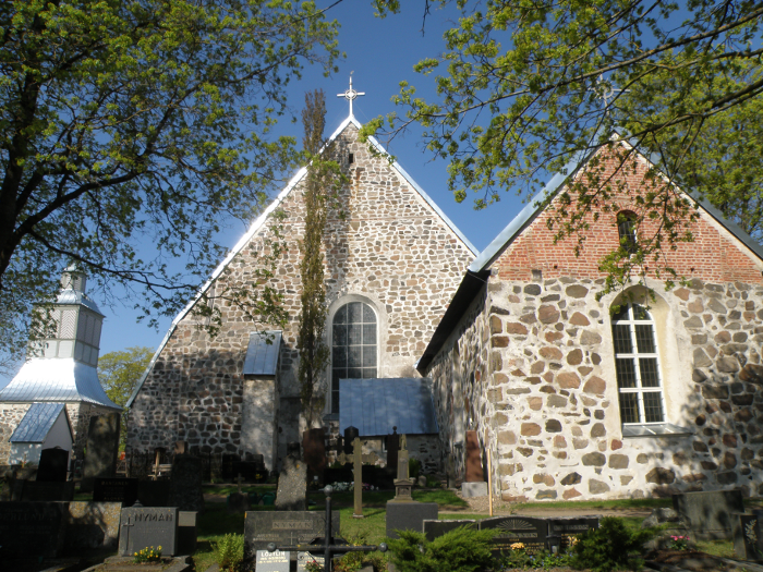 Paraisten kirkon länsipääty. Etuoikealla ns. "Finska kyrkan", nykyiseltä nimeltään Agricola-kappeli.